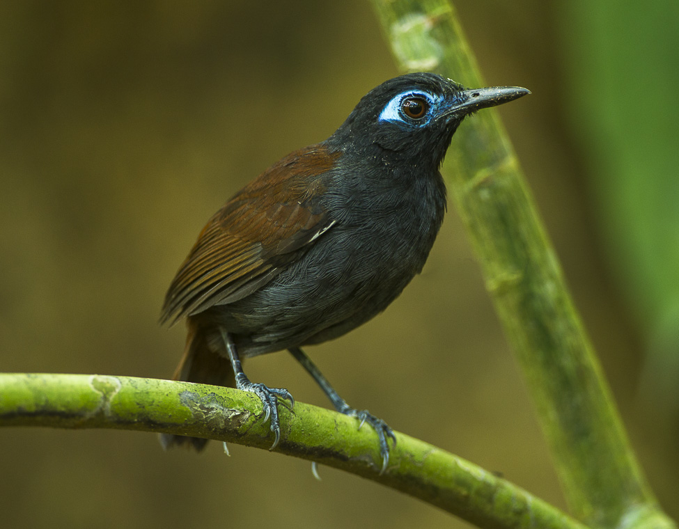 Chestnut-backed Antbird (Myrmeciza exsul) - Sarapiqui - Costa Rica_S4E9851